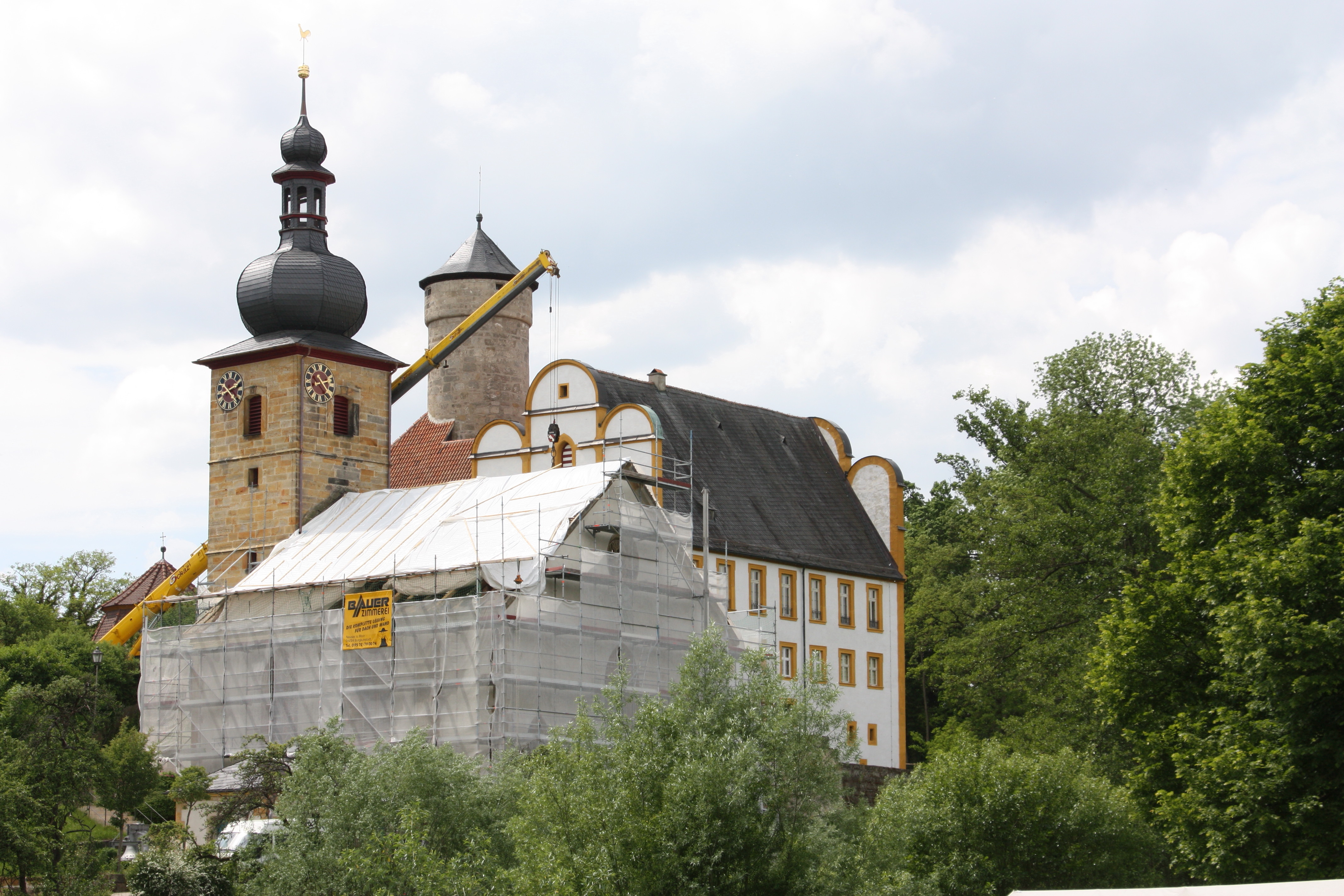 Altenkunstadt OT Strössendorf